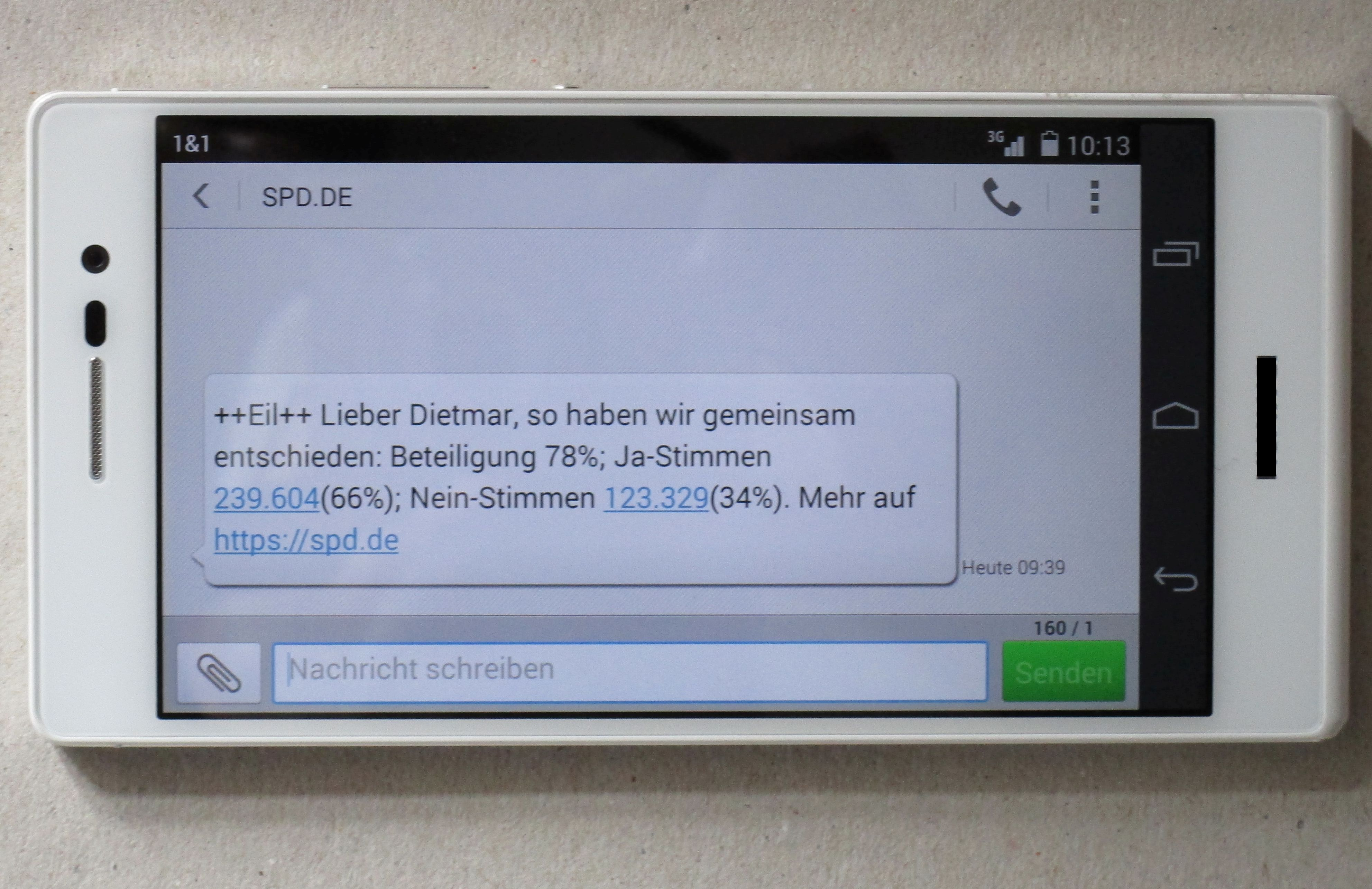 Die SPD-Mitglieder, die sich in der SPD-Zentrale mit ihrer Mobiltelefon-Nummer registriert hatten, wurden am 4. März 2018, dem Tag der Bekanntgabe des Ergebnisses über das Mitgliedervotum der SPD zum Koalitionsvertrag 2018, über die Ergebnisse per SMS informiert. Hier eine am 4. März 2018 um 9.39 Uhr eingegangene SMS.